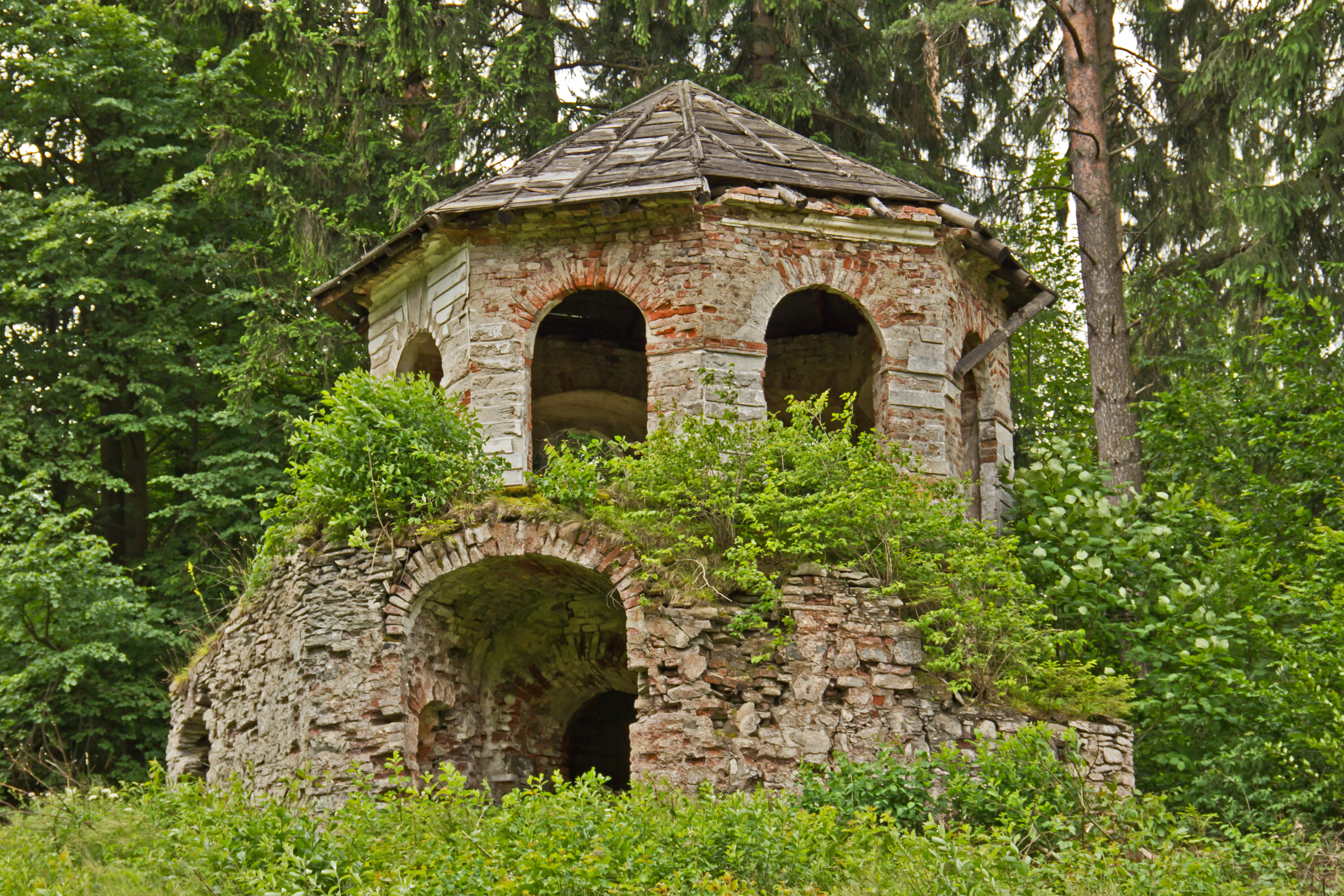 Die sogenannte Teufelskirche an einem Hang in einer Waldschneise südwestlich von Schloss Wetzlas ist ein turmartiger Gartenpavillon in fühklassizistischen Formen, der im vierten Viertel des 18. Jahrhunderts durch die Familie Teufl erbaut wurde.